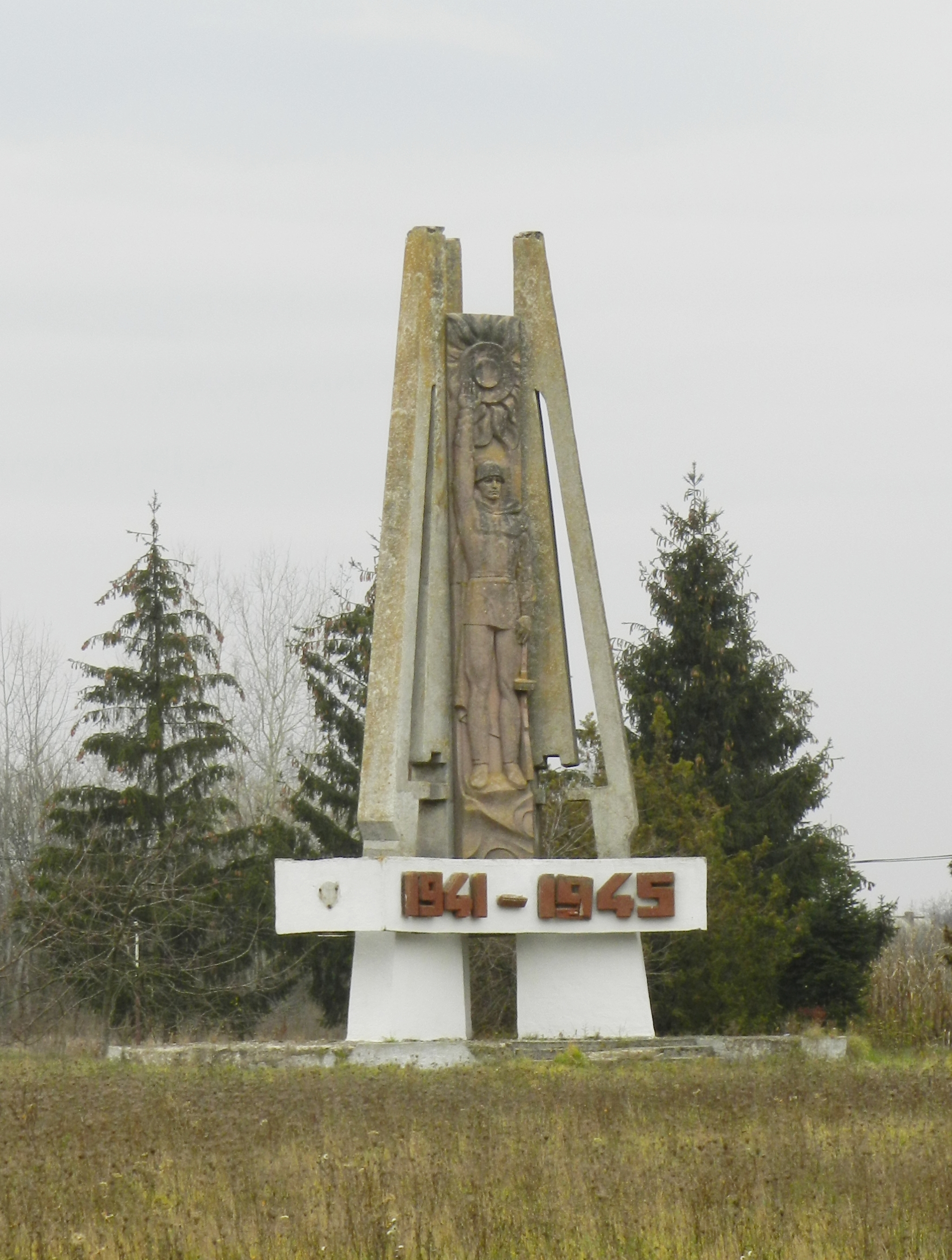 Пам’ятник радянським воїнам (скульптор І. М. Баранич, архітекор В. С. Роговський), 1985 р.